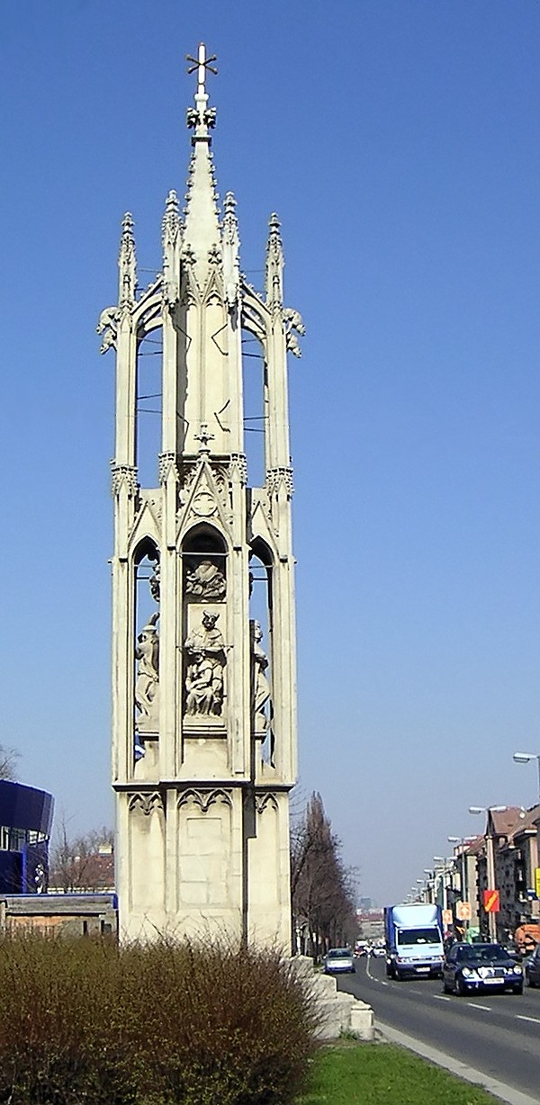 Spinnerin am Kreuz, Wien, gotische Steinsäule, Blick vom Wienerberg auf die Triesterstrasse; photographiert von Binter am 03.04.2005 Kategorie:Säule